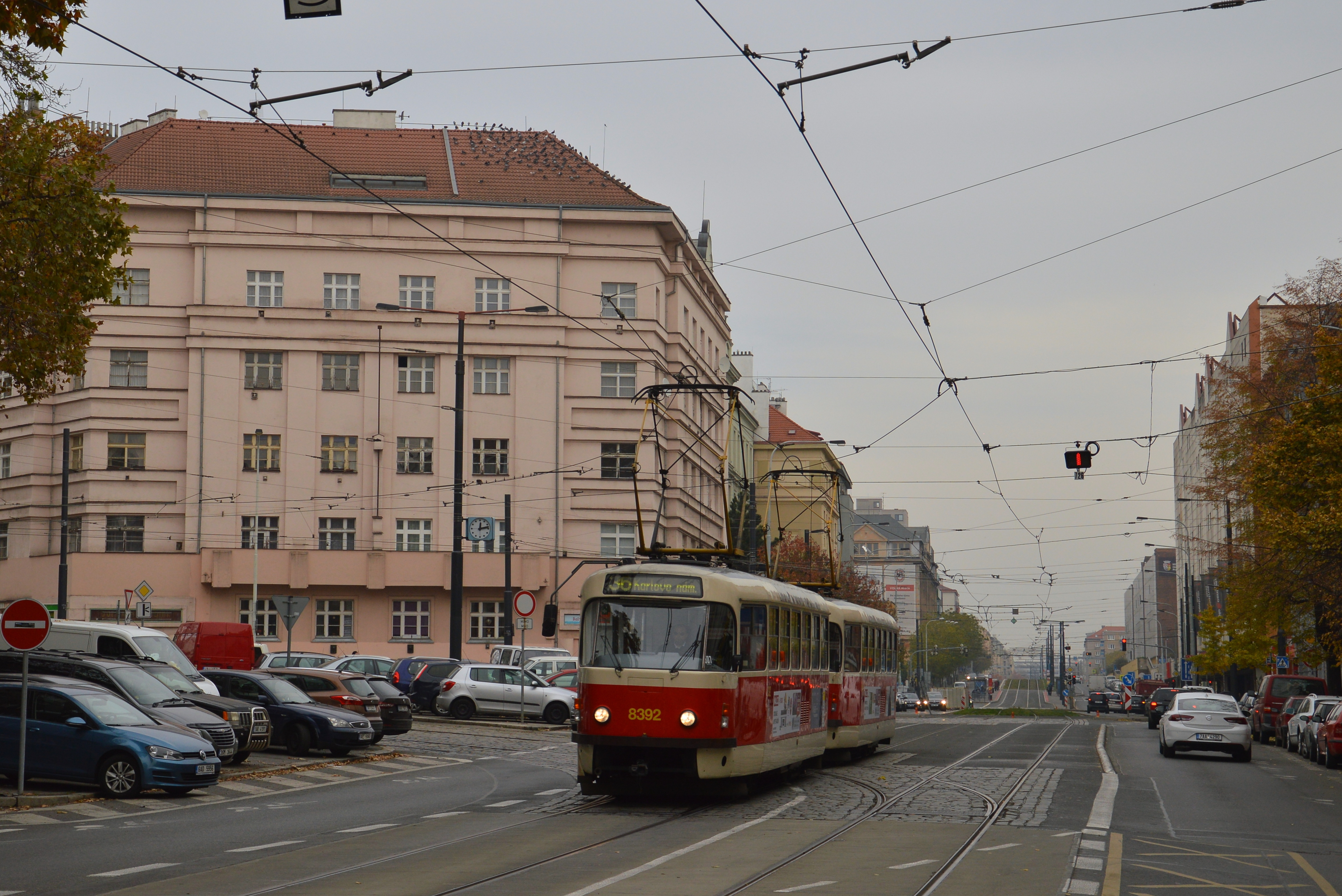 Tramvajová linka 36 mezi zastávkami Koh-i-noor a Bohemians, v křižovatce s ulicí Minskou.